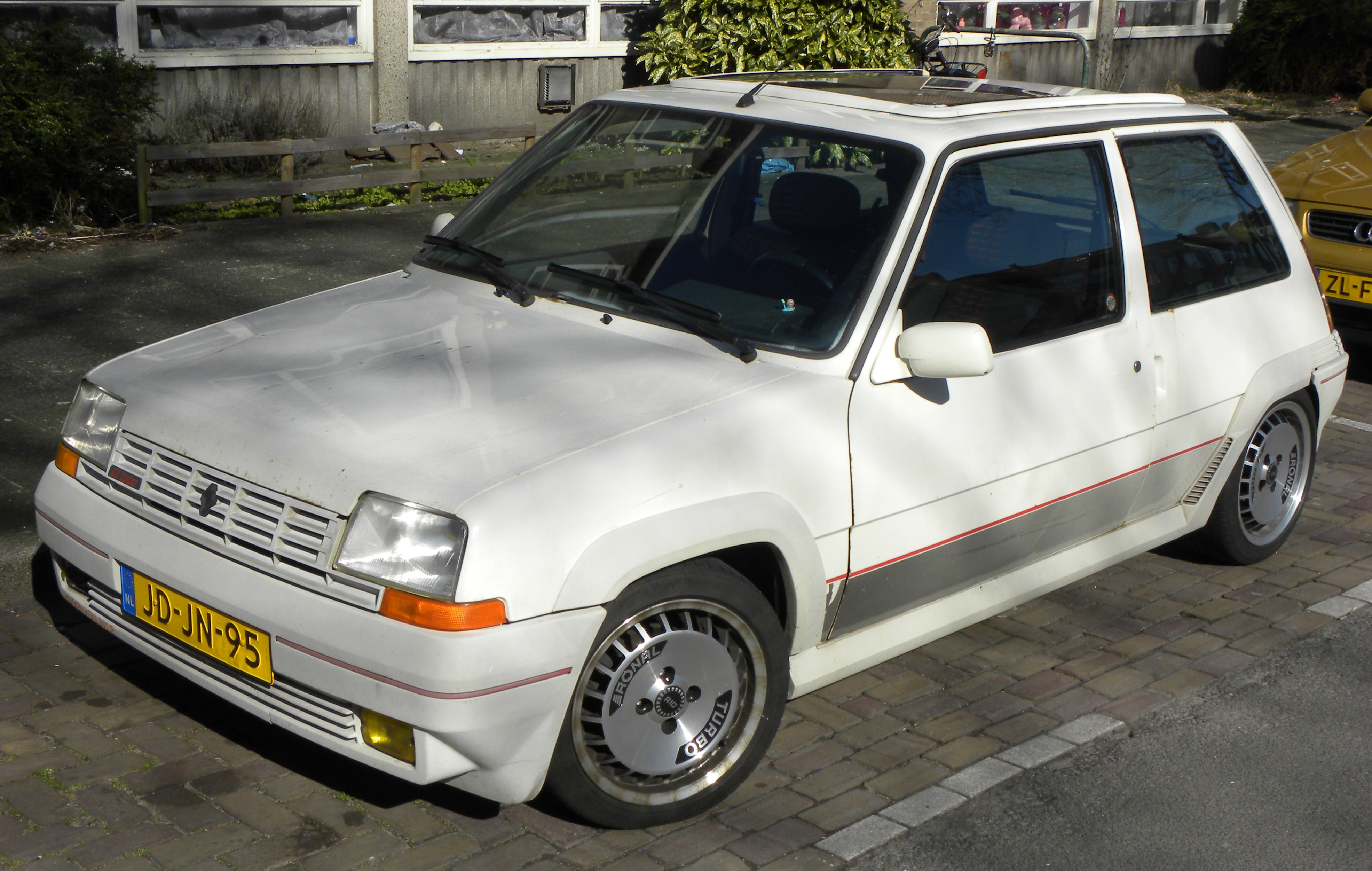 Renault Super 5 GT turbo Mk. I (1985-88)